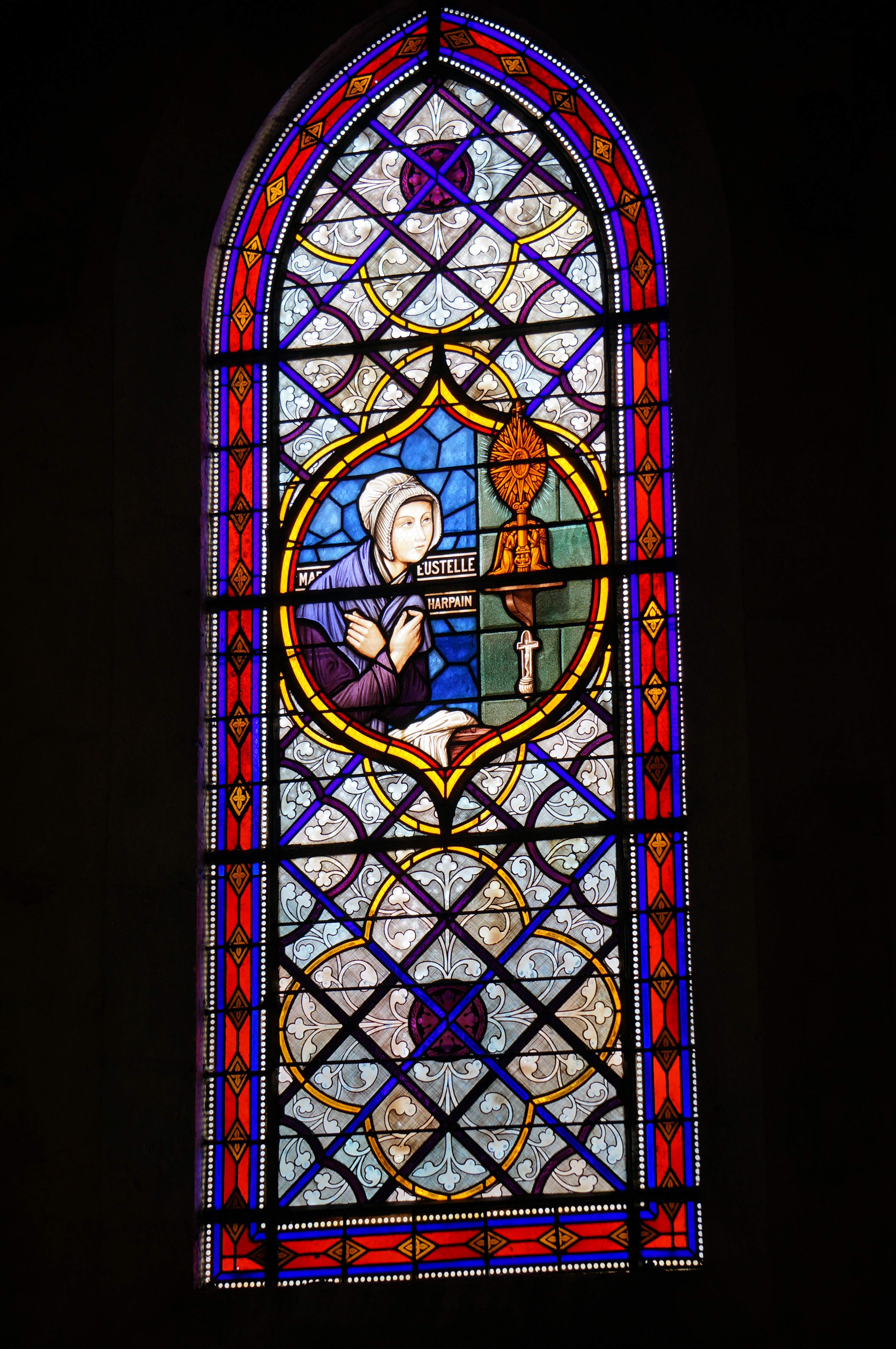 à l'intérieur de la cathédrale.